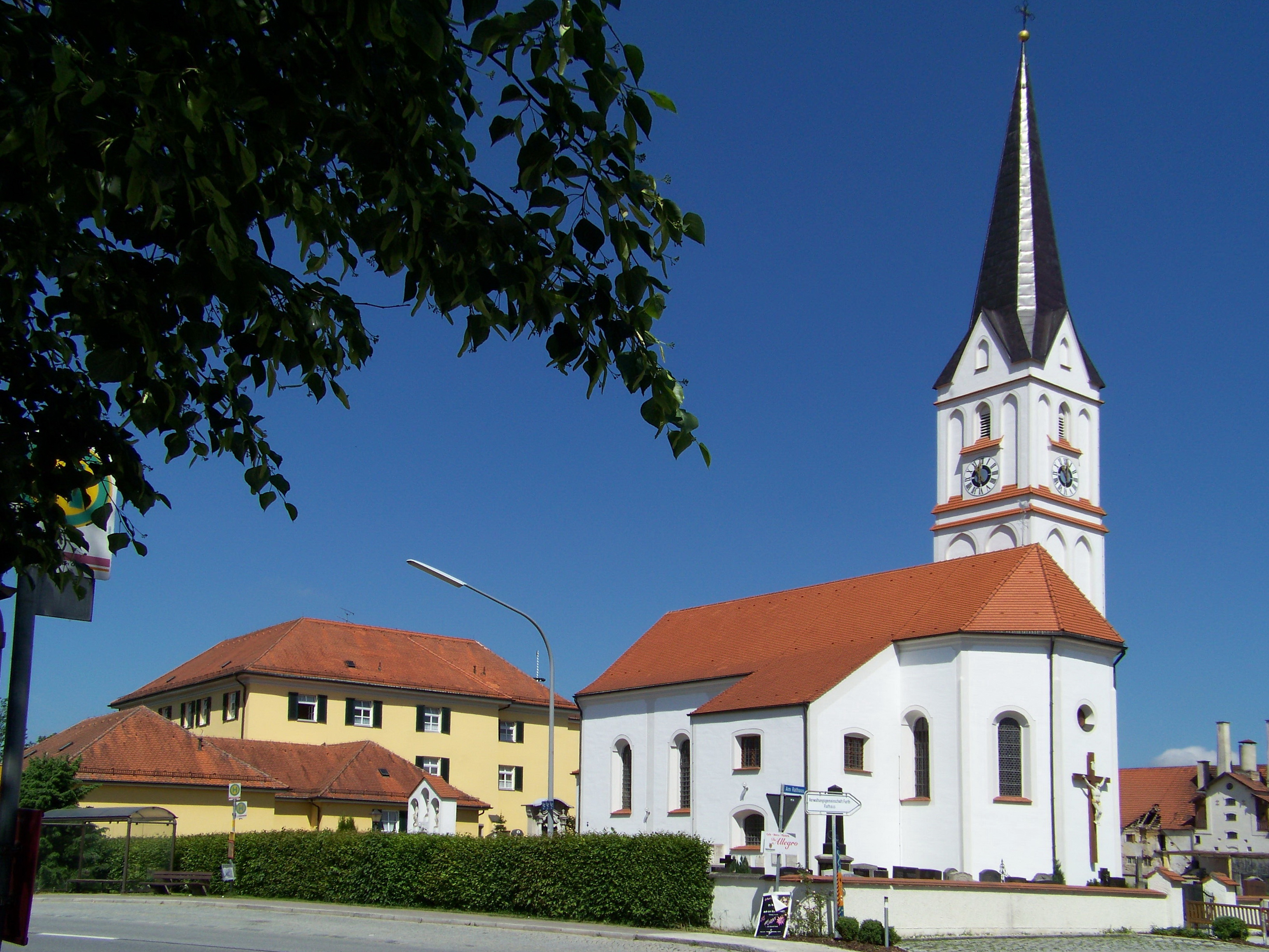 Furth bei Landshut. Katholische Kirche St. Sebastian, spätgotisch, 15. Jahrhundert, barockisiert 1741; mit Ausstattung.